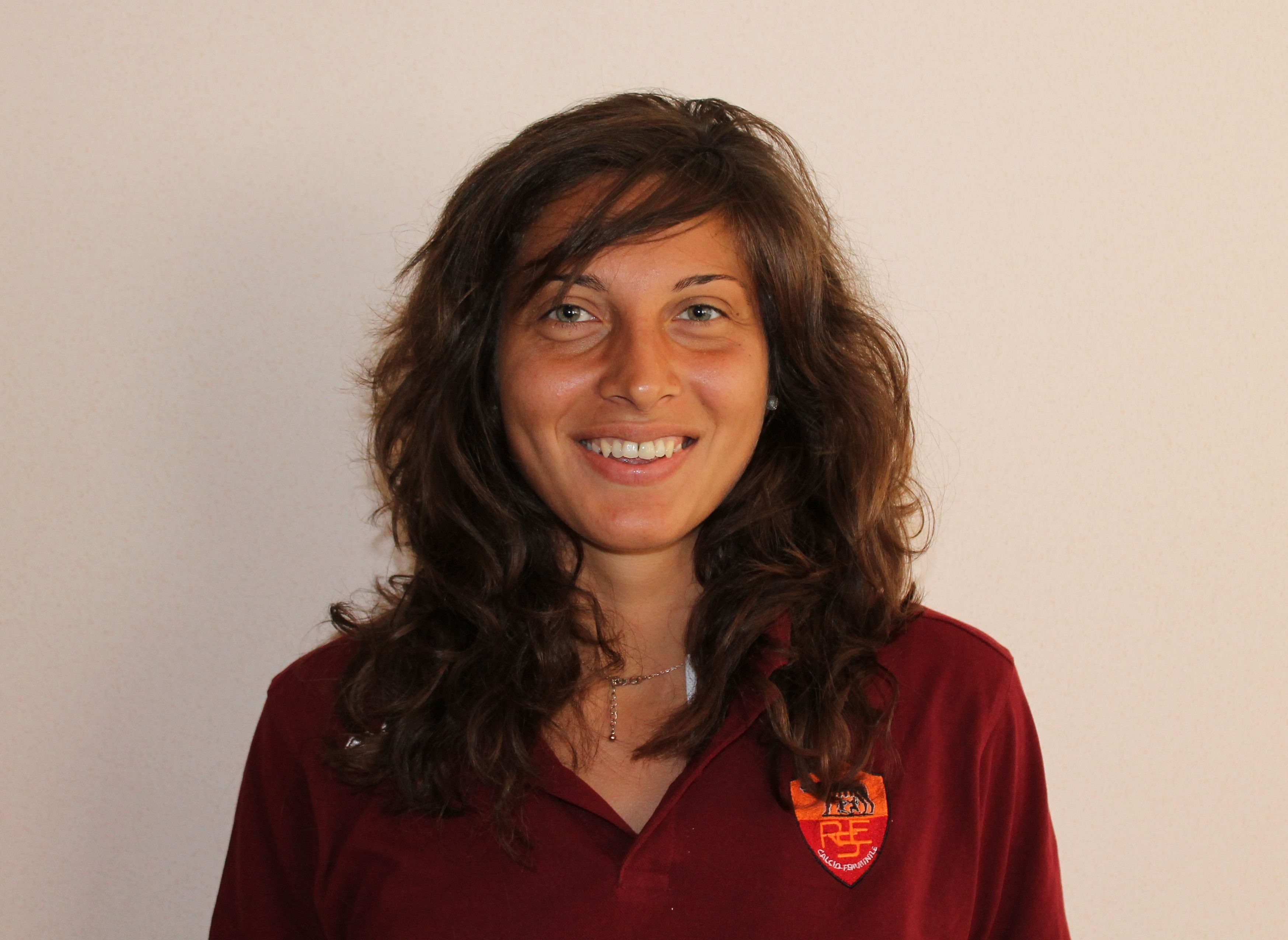 Foto personale